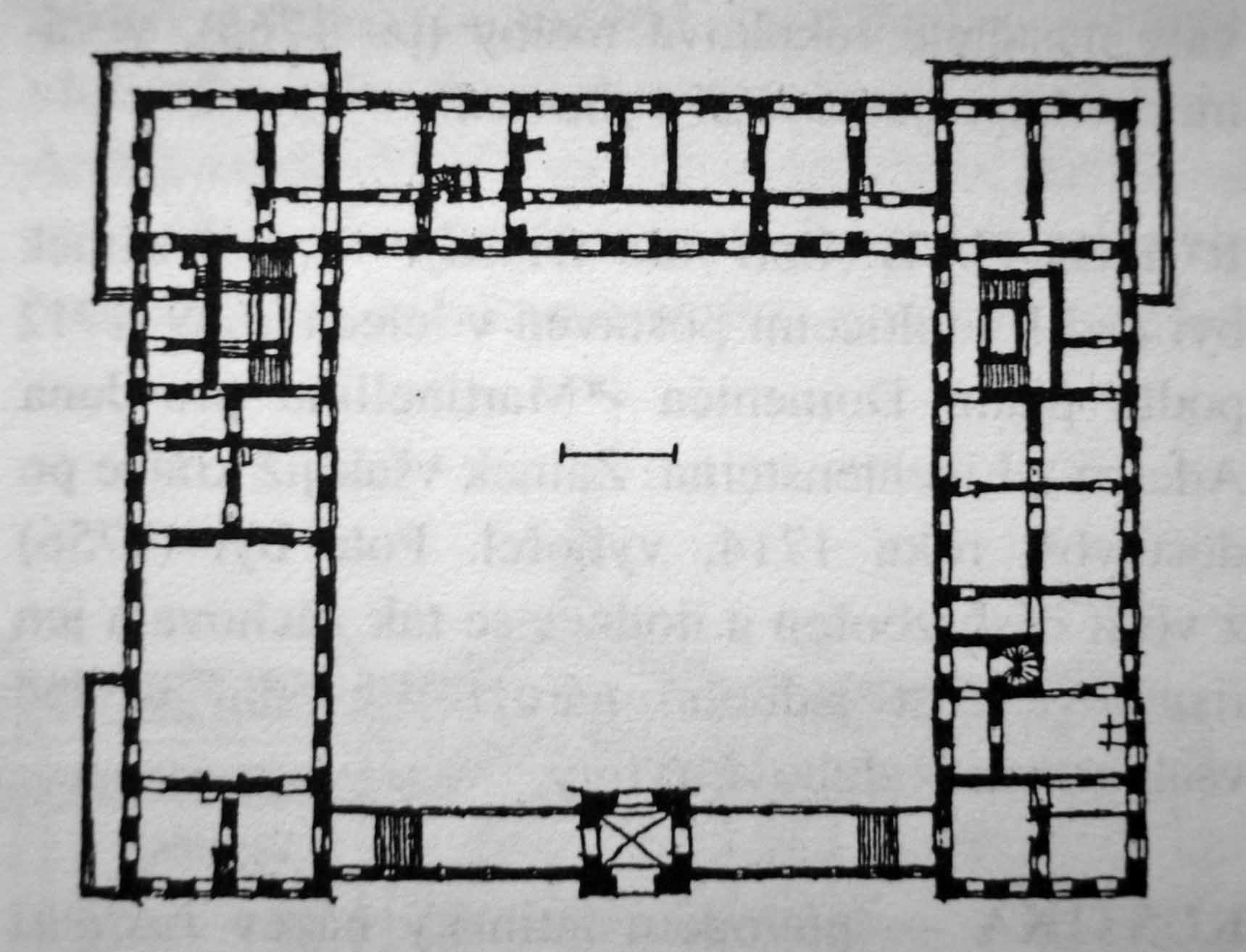 Grundriss von Schloss Raudnitz (Zámek Roudnice nad Labem)